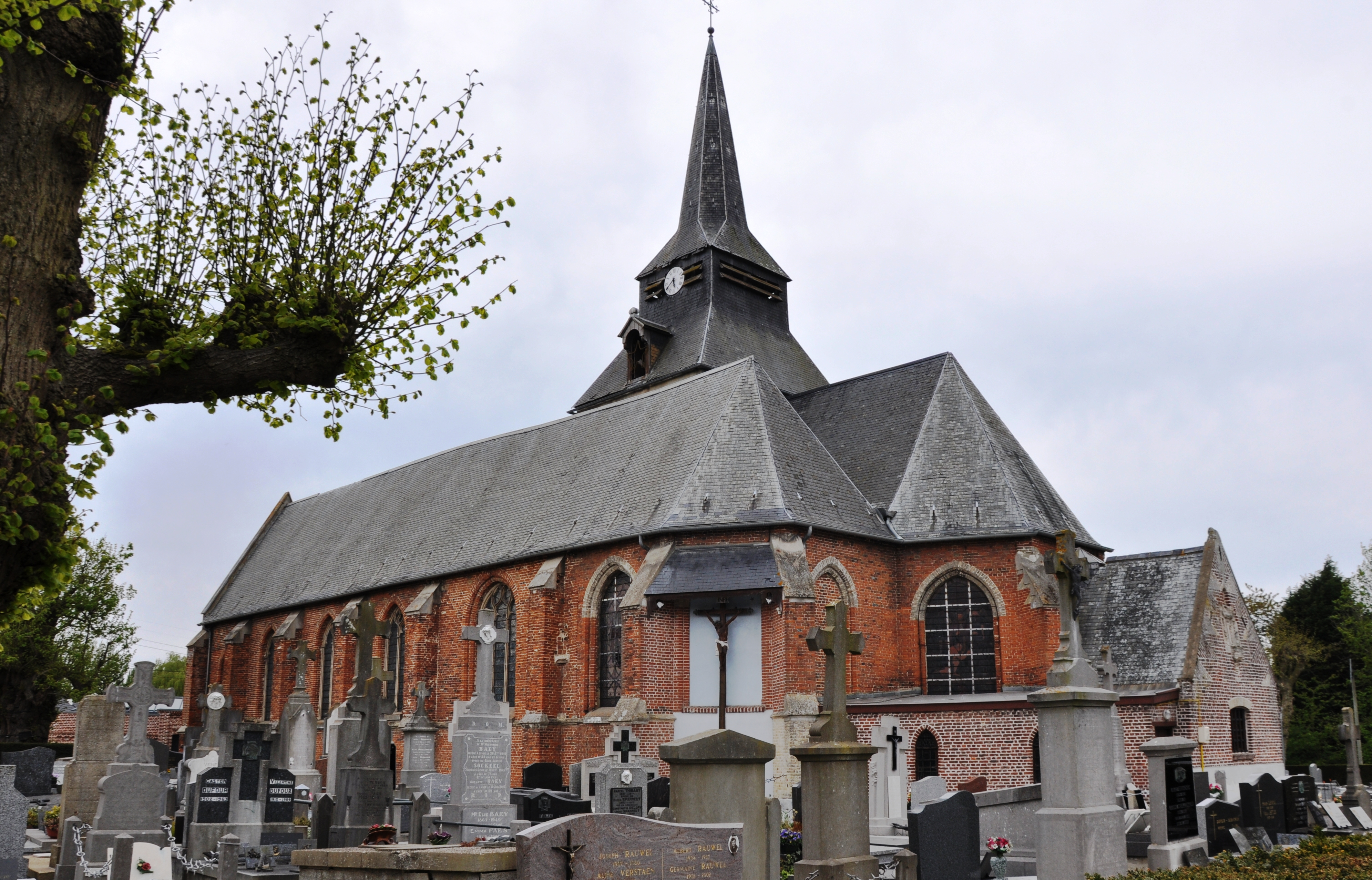 Eglise St Vaast de Lynde